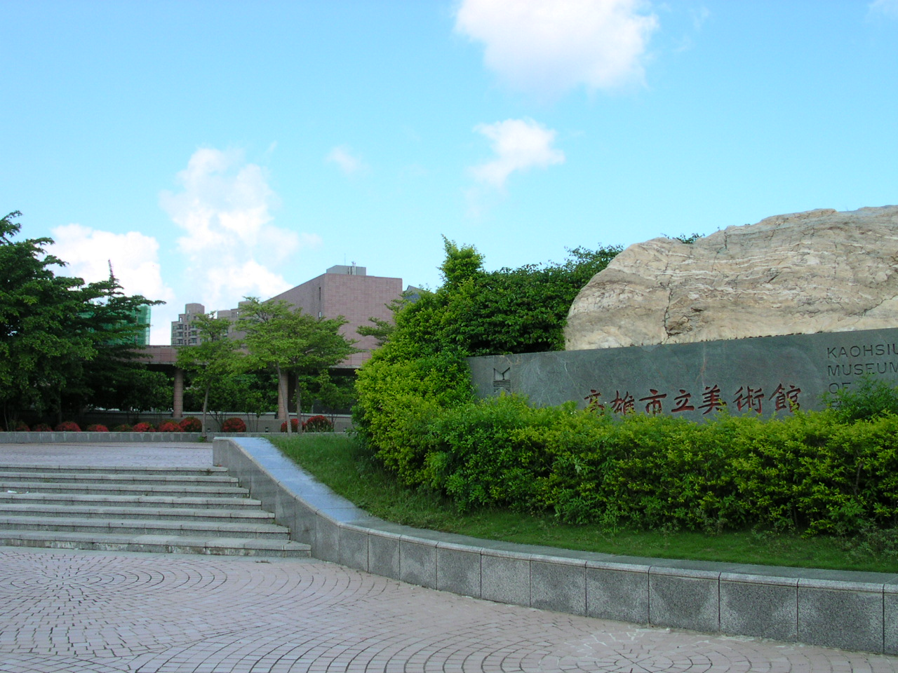 "Kaohsiung Museum of Fine Arts" in Taiwan